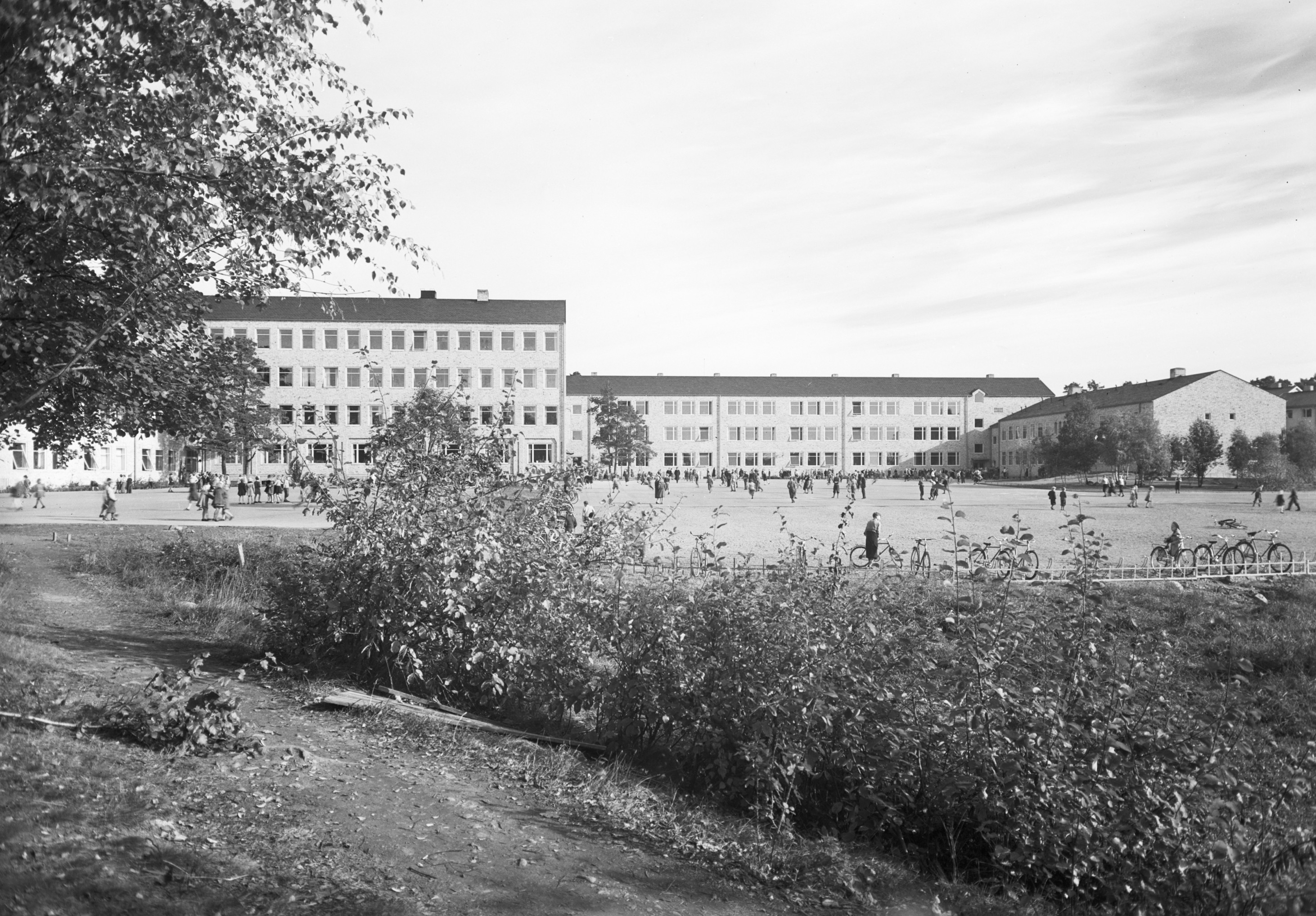 Årsta folkskola Exteriör, Arkitekt: Åkermark, Stig